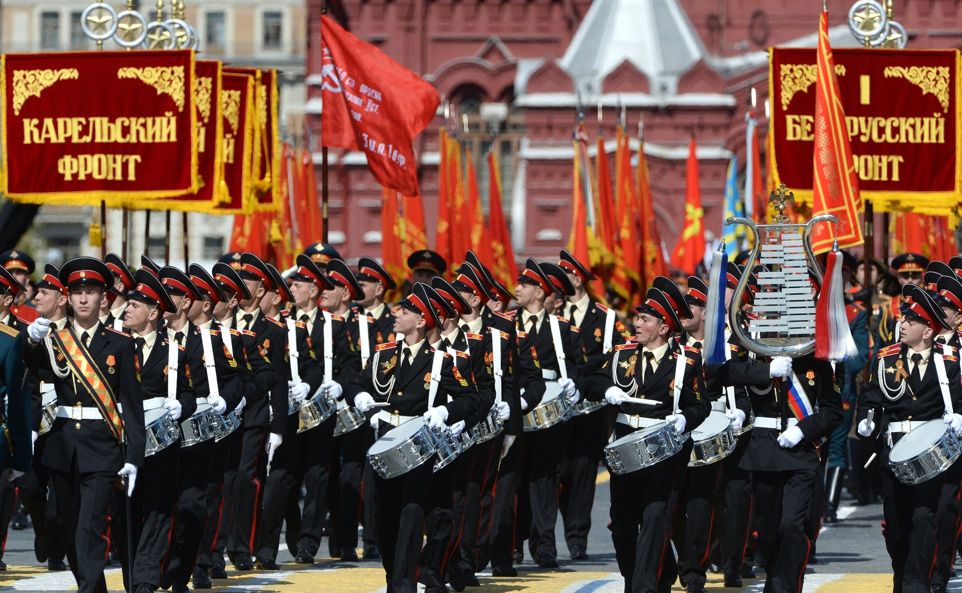 Военнослужащие сводного оркестра во время военного парада в ознаменование 70-летия Победы в Великой Отечественной войне 1941–1945 годов.